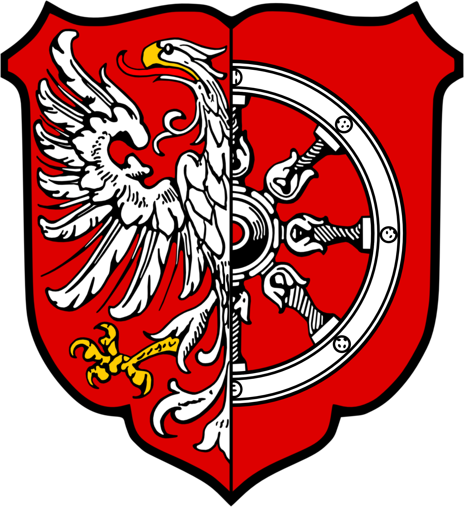 Das Wappen der Stadt Ratibor. Schläsch: Doas Woappa der Stoadt Rattebor.